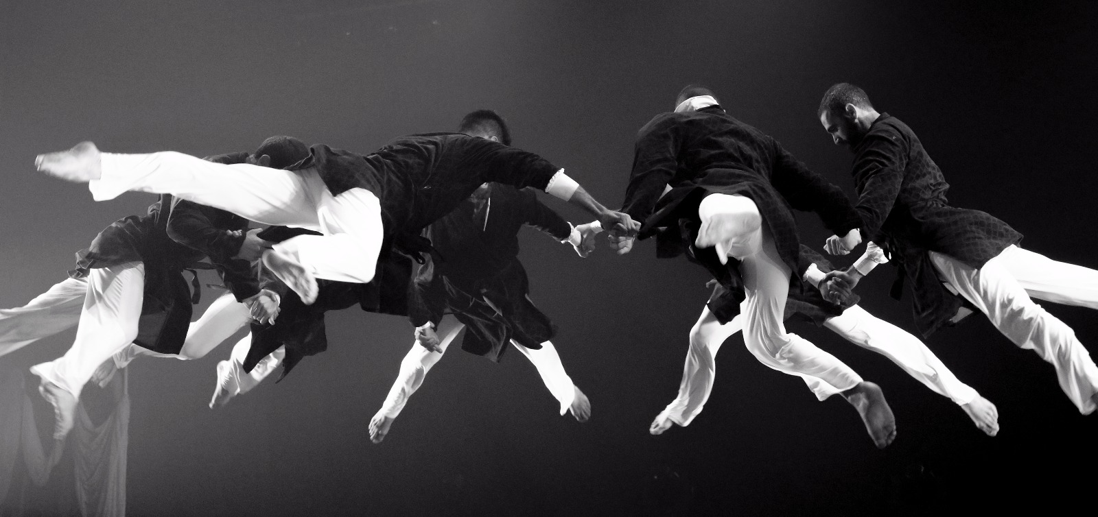 תמונת מחול